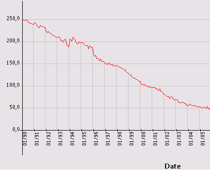 Production dans le secteur Habillement/Cuir, CVS-CJO, INSEE Licensing Catégorie:Schémas